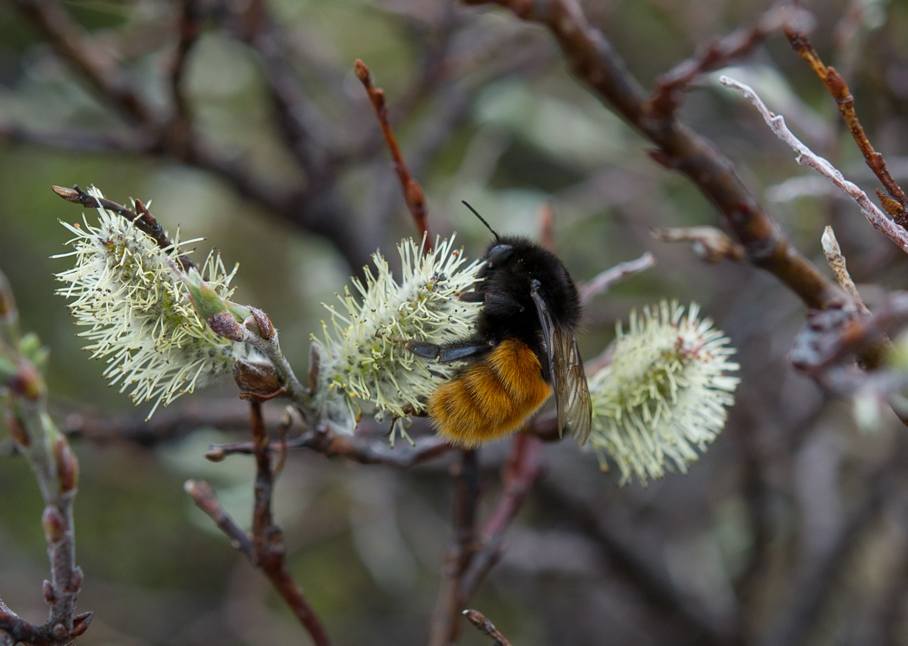 Ei alpehumle (Bombus alpinus) på ein blømande Salix. Frå Orkelsjøen i Oppdal.